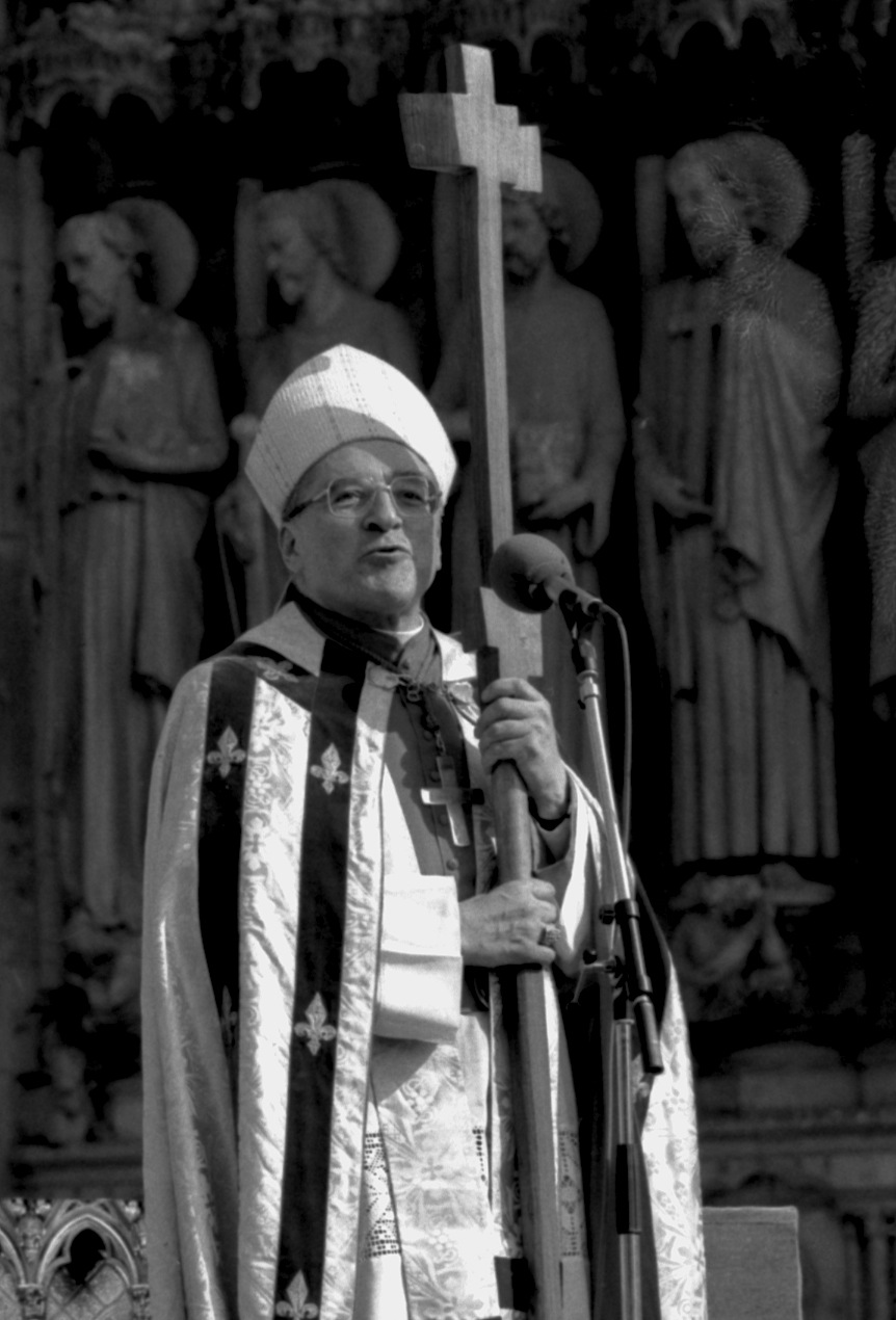 Le cardinal Jean-Marie Lustiger sur le parvis de Notre Dame de Paris le 15 août 1988.